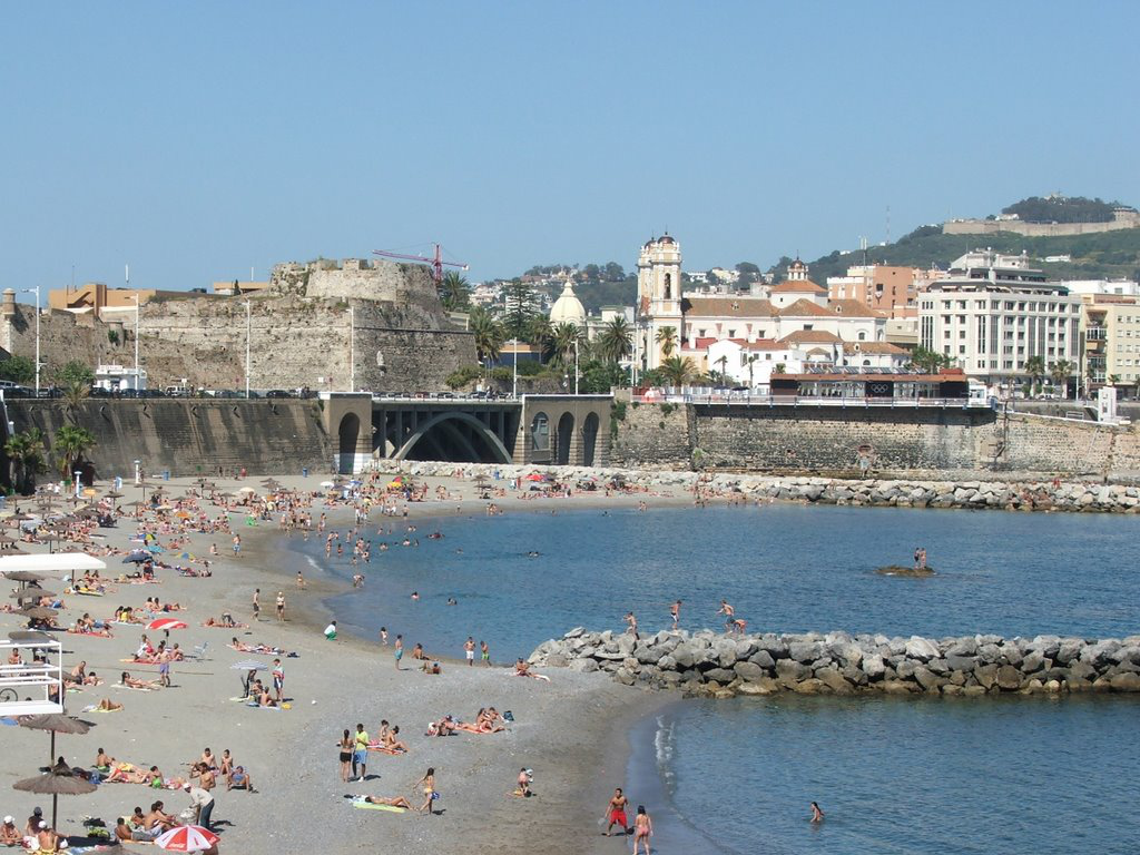 Playa de la Ribera, Murallas Reales y catedral de Ceuta